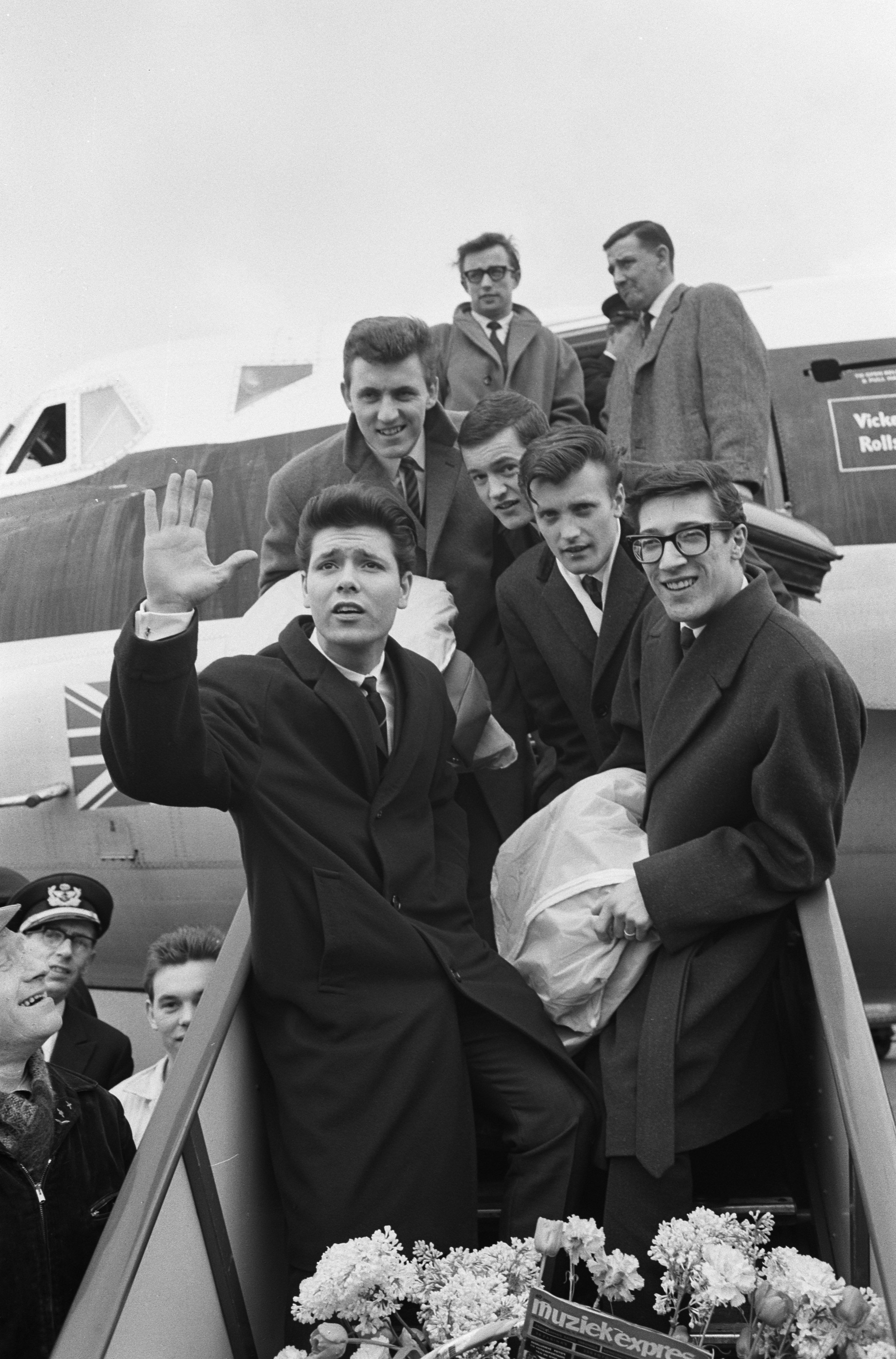 Collectie / Archief : Fotocollectie Anefo Reportage / Serie : [ onbekend ] Beschrijving : Cliff Richard aankomst met zijn Shadows Datum : 6 april 1962 Locatie : Noord-Holland, Schiphol Trefwoorden : artiesten, groepen, muziek, zangers Persoonsnaam : Richard, Cliff Instellingsnaam : Shadows, The Fotograaf : Pot, Harry / Anefo Auteursrechthebbende : Nationaal Archief Materiaalsoort : Negatief (zwart/wit) Nummer archiefinventaris : bekijk toegang 2.24.01.05 Bestanddeelnummer : 913-7397